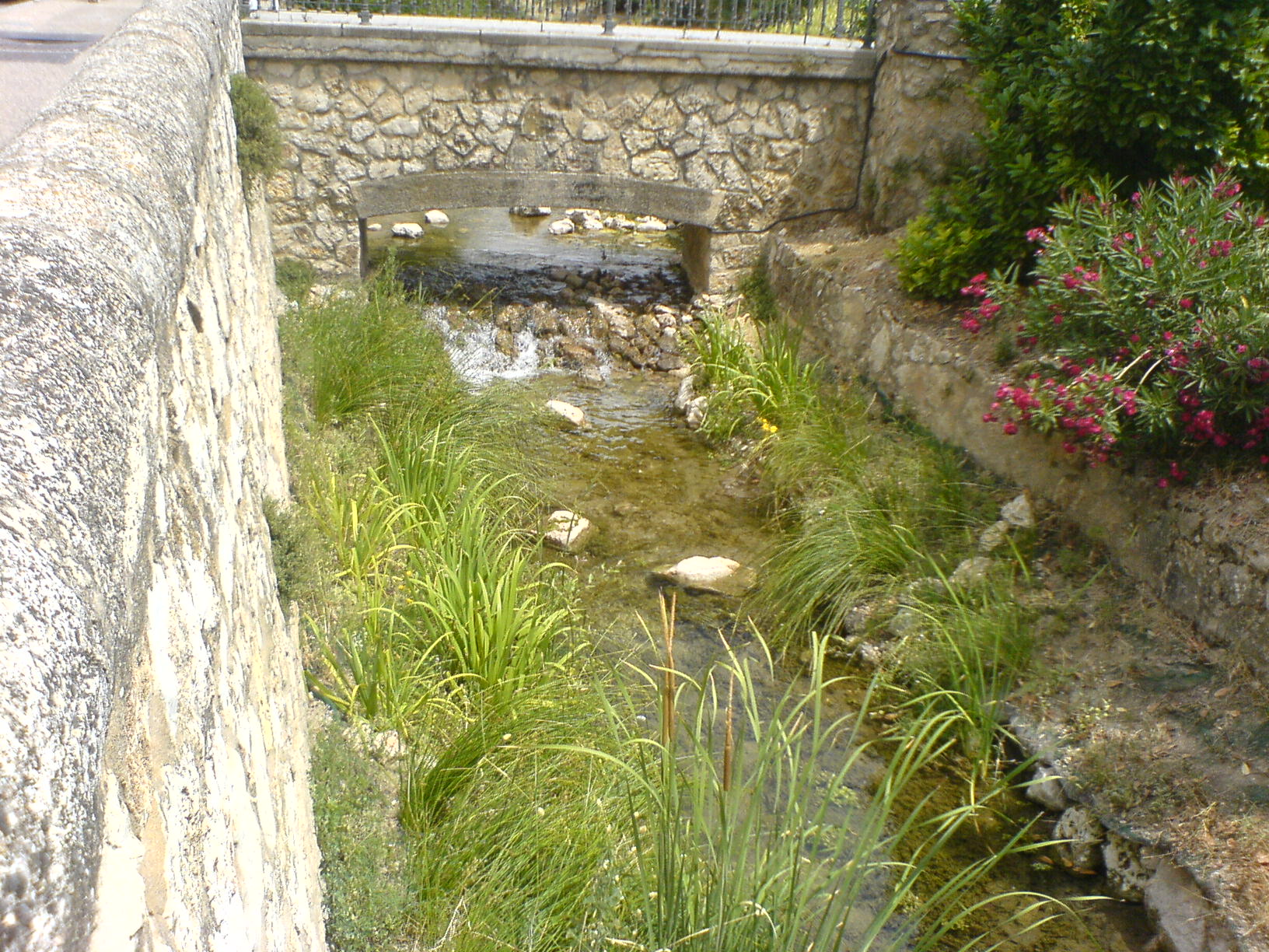 Río Huécar a su paso por Cuenca